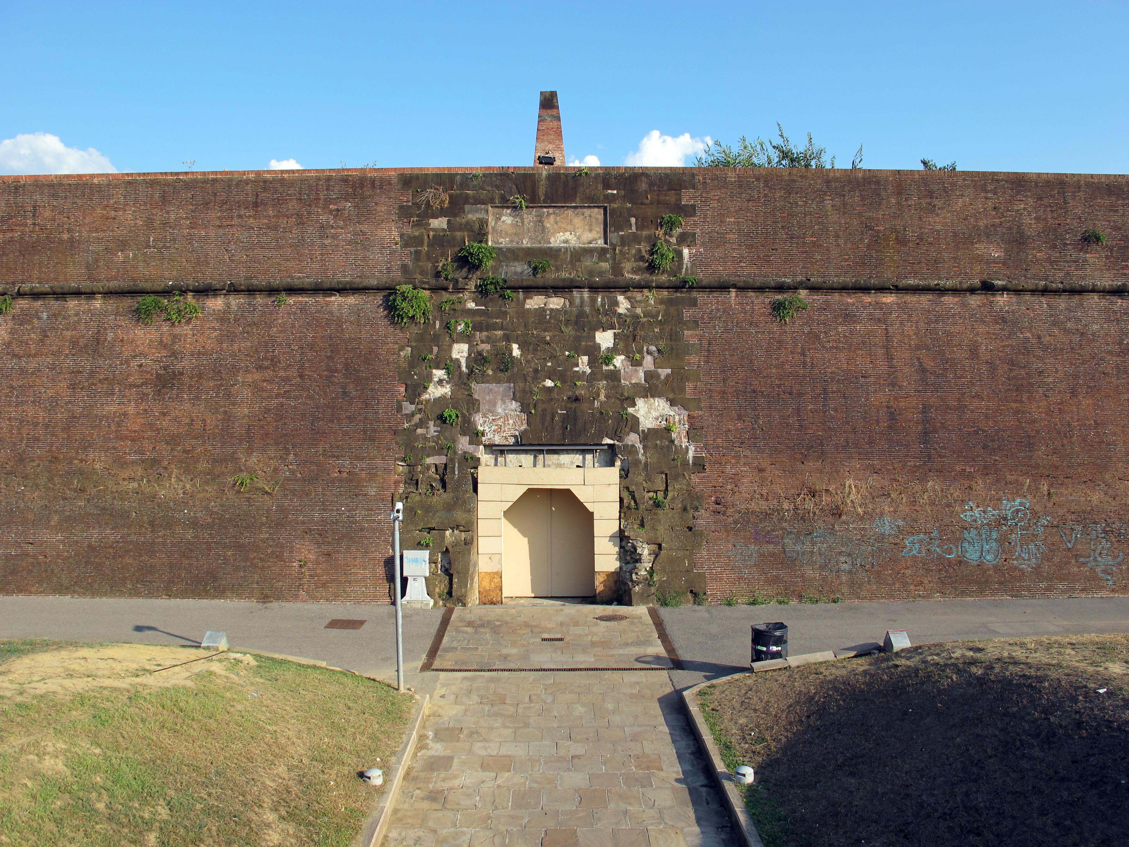 Firenze (vedi titolo)